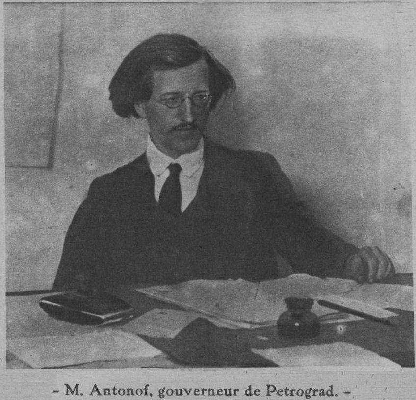 M Antonof, gouveneur de Petrograd, chargé du commandement mmilitaire de la ville, photographie publiée en janvier 1918.